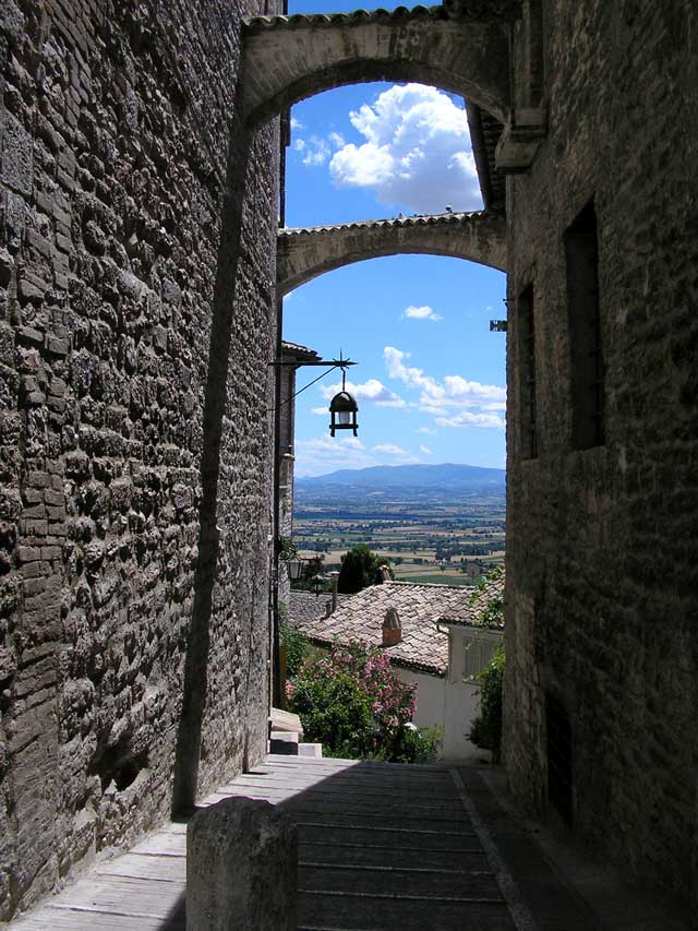 Assisi, ItaliaAssisi